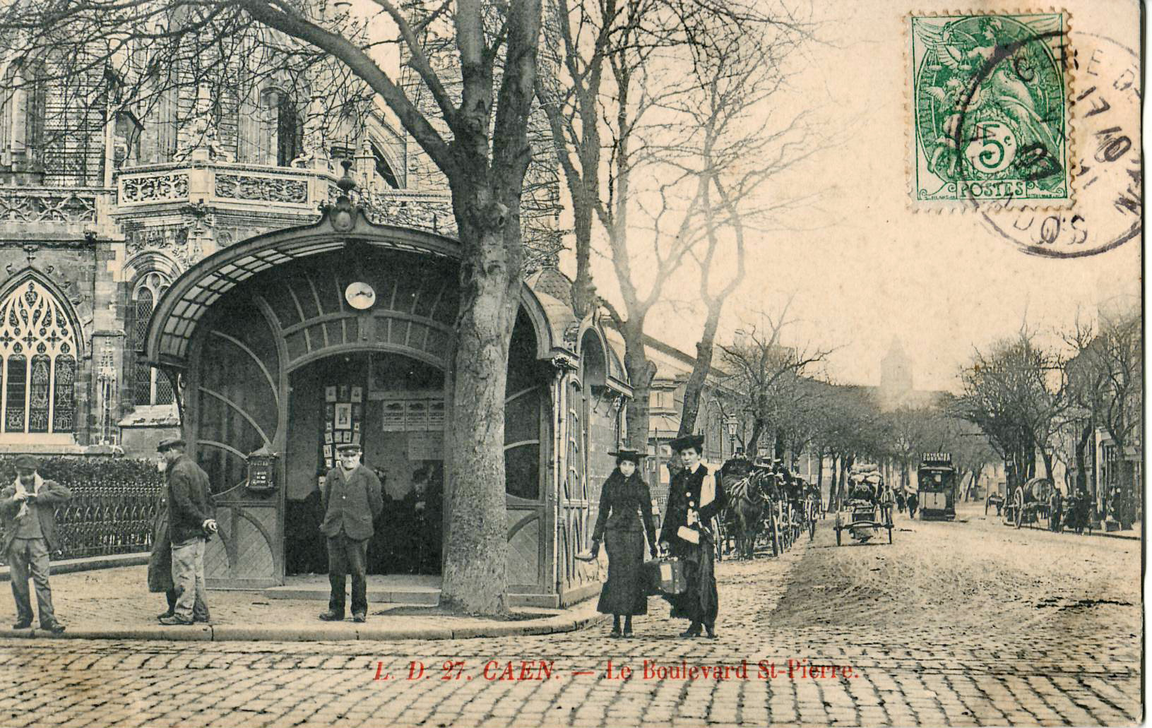 Carte postale ancienne éditée par L. D. n°27 : CAEN - Le Boulevard Saint-Pierre. Station de tram de style art nouveau, place Saint-Pierre à Caen vers 1901-1910